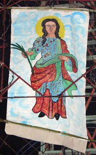 Saint Prisca